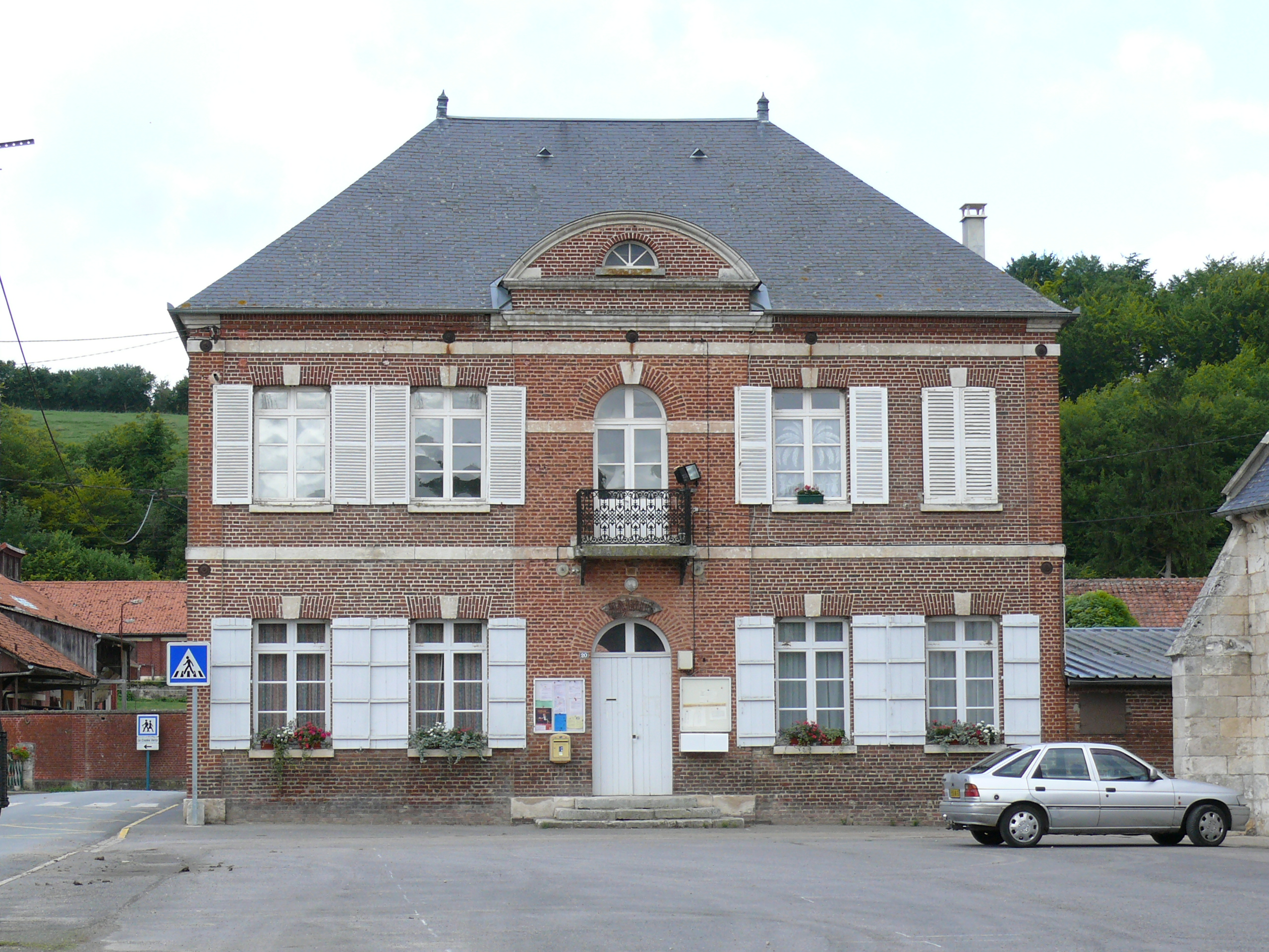 Mairie de Fontaine-Bonneleau (Oise - Picardie - France)